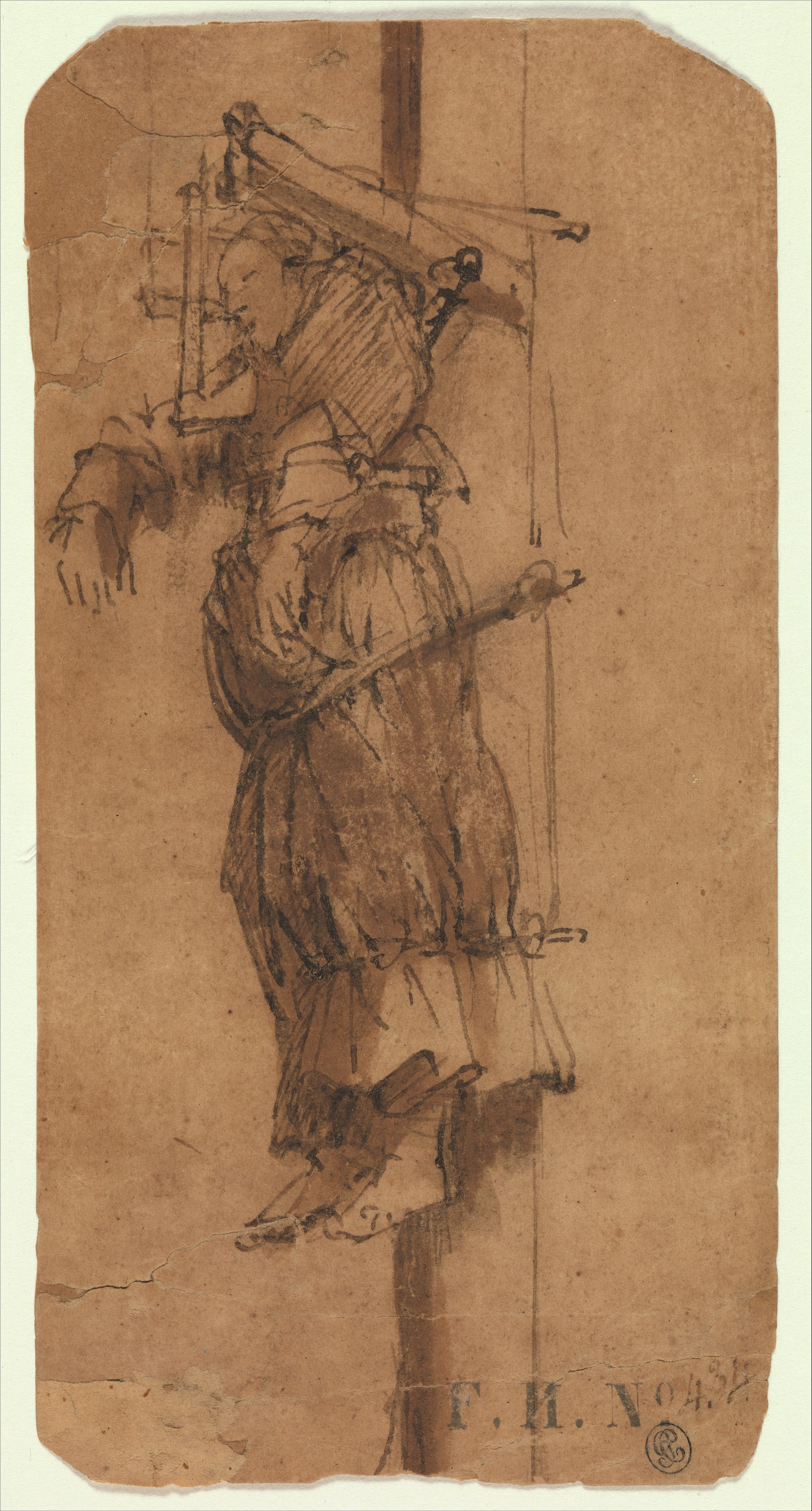 Drawing; Drawings